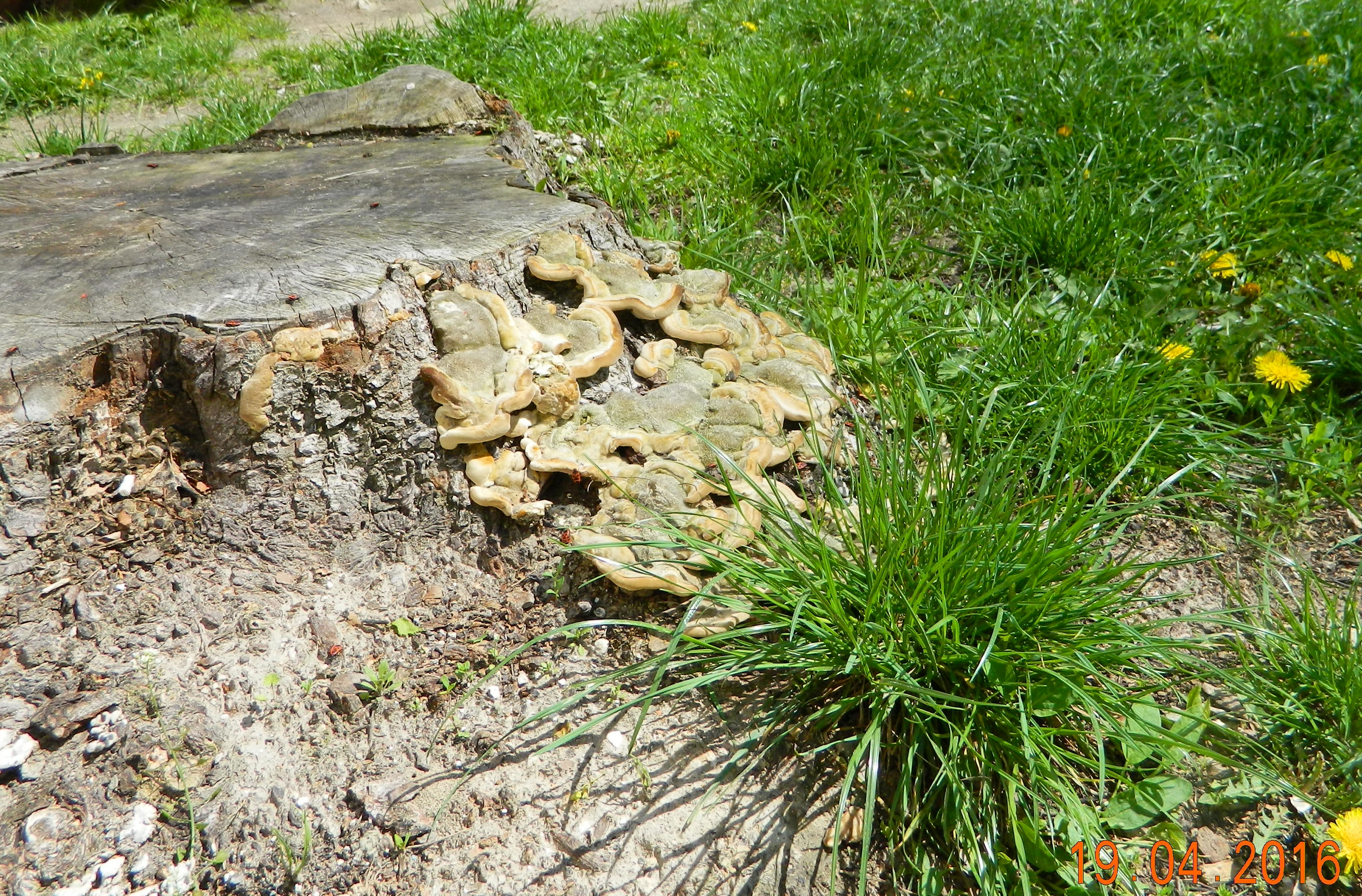 Гриб-трутовик на пеньку каштана. Київ, 19.04.2016.英语：Tinder fungus on stump chestnut. Kyiv, 04.19.2016